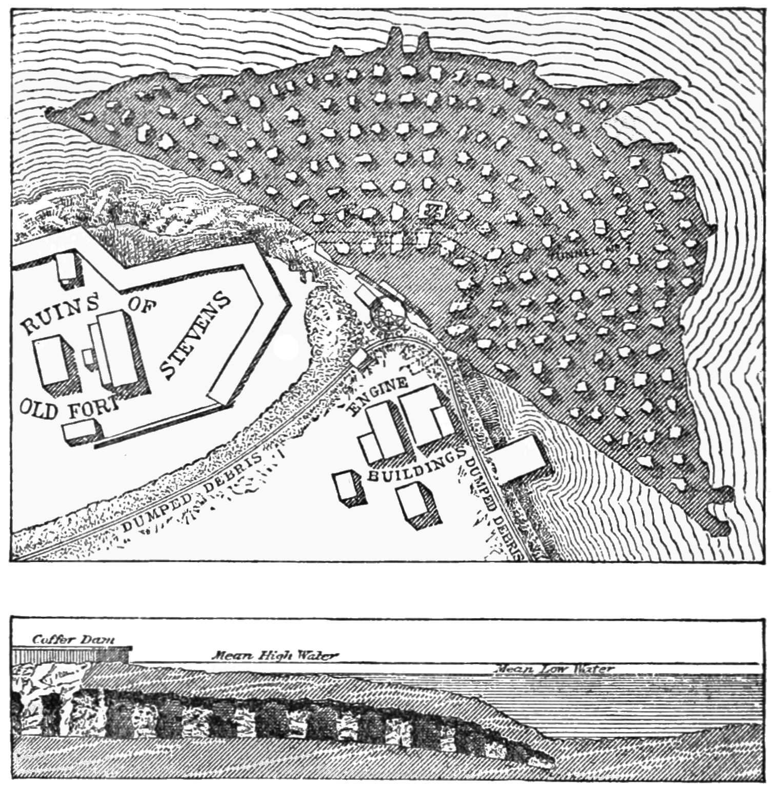 Hallet Point excavations and Tunnel 7